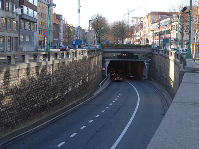 ingang (kant Antwerpen) van de Waaslandtunnel onder de Schelde